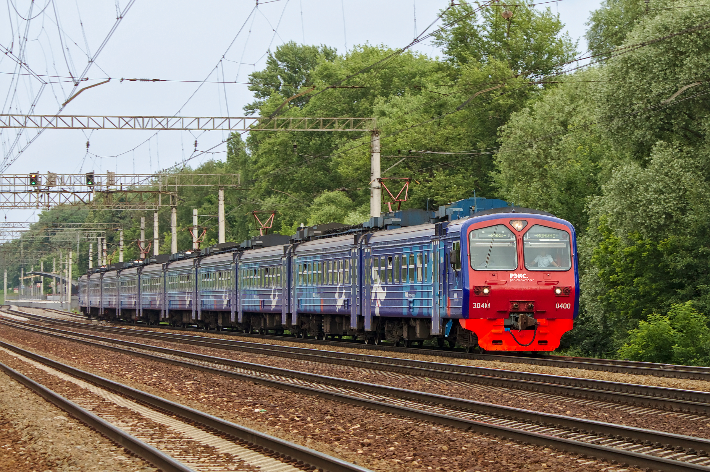 ЭД4М-0400, Лосиноостровская - Москва-Пассажирская-Ярославская. см. фото 631874 в альбоме автора